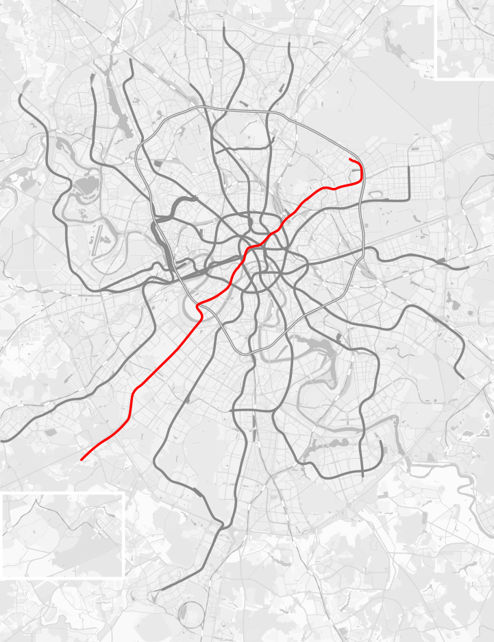 Сокольническая линия Московского метрополитена